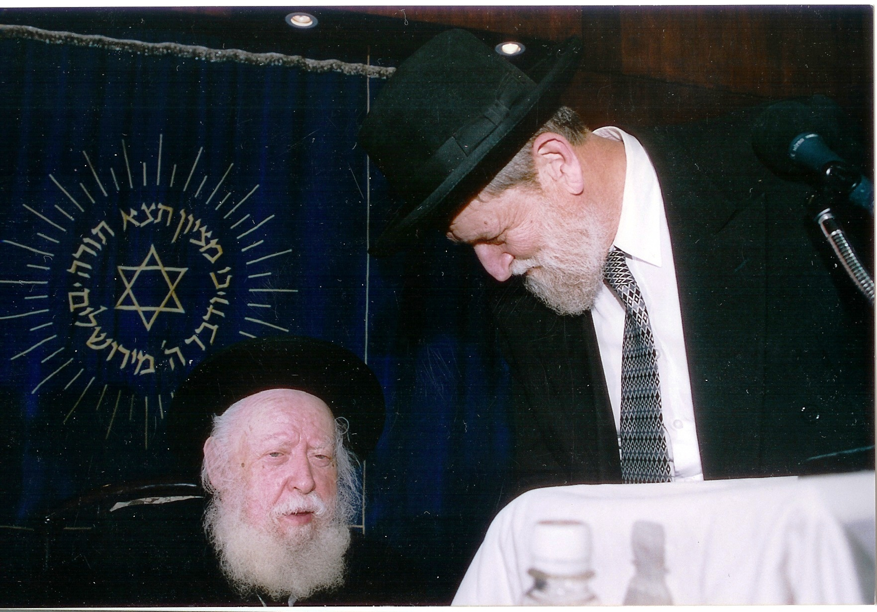 הרב שאר ישוב הכהן והרב אברהם שפירא בטקס יום ירושלים